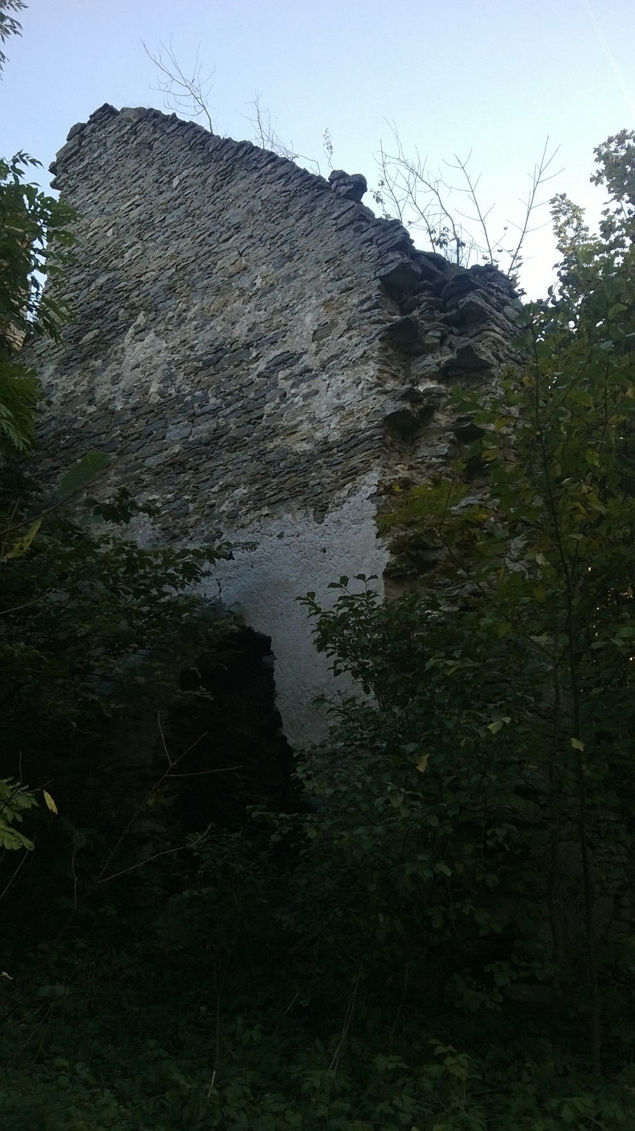 Muratsi Manor, Saaremaa